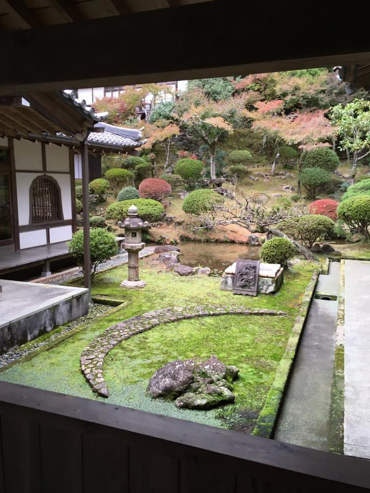 龍澤寺の庭